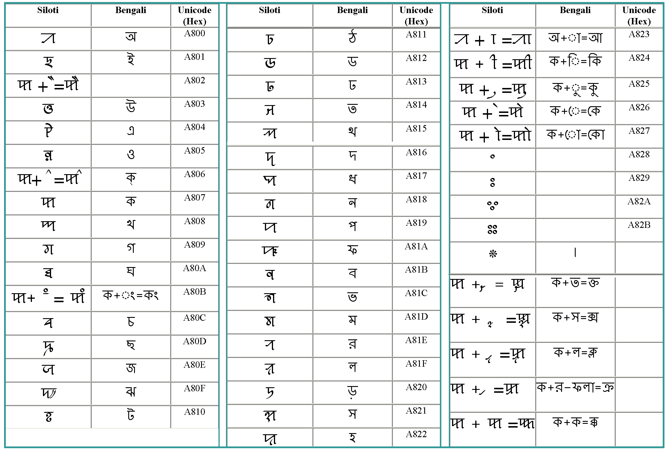 Siloti Nagri and Bangla